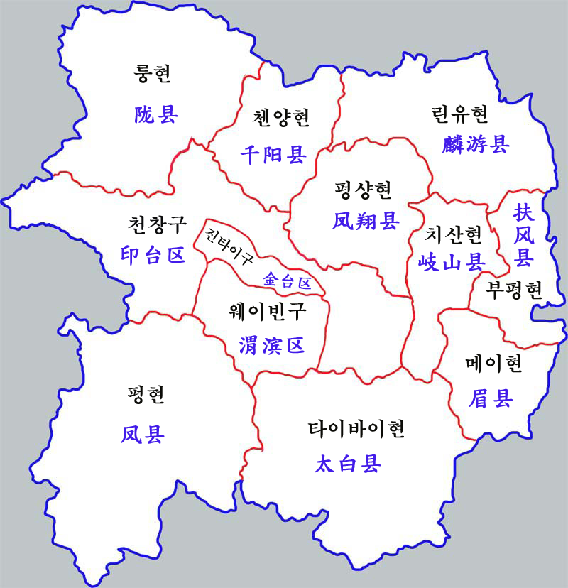 바오지시 현급행정구역도